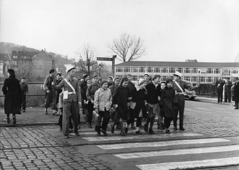 Schülerlotsendienst in Bonn Wegen des immer gefährlicher werdenden Strassenverkehrs sind die Schulen seit kurzem dazu übergegangen, ältere Schüler als "Lotsen" für die jüngeren einzuteilen und zu unterweisen. Sie werden wie auf dem Bild zu sehen ist mit einem Signalstab ausgerüstet und stoppen damit geanu wie die Verkehrspolizei den Verkehr an besonders gefährlichen Übergängen.